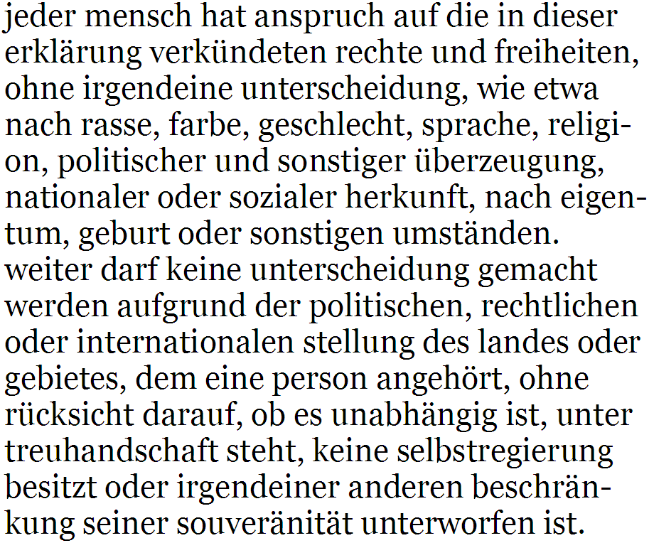 Textbeispiel Kleinschreibung / selbsterstellt / der Text (aus der Allg. Erklärung der Menschenrechte) ist gemeinfrei